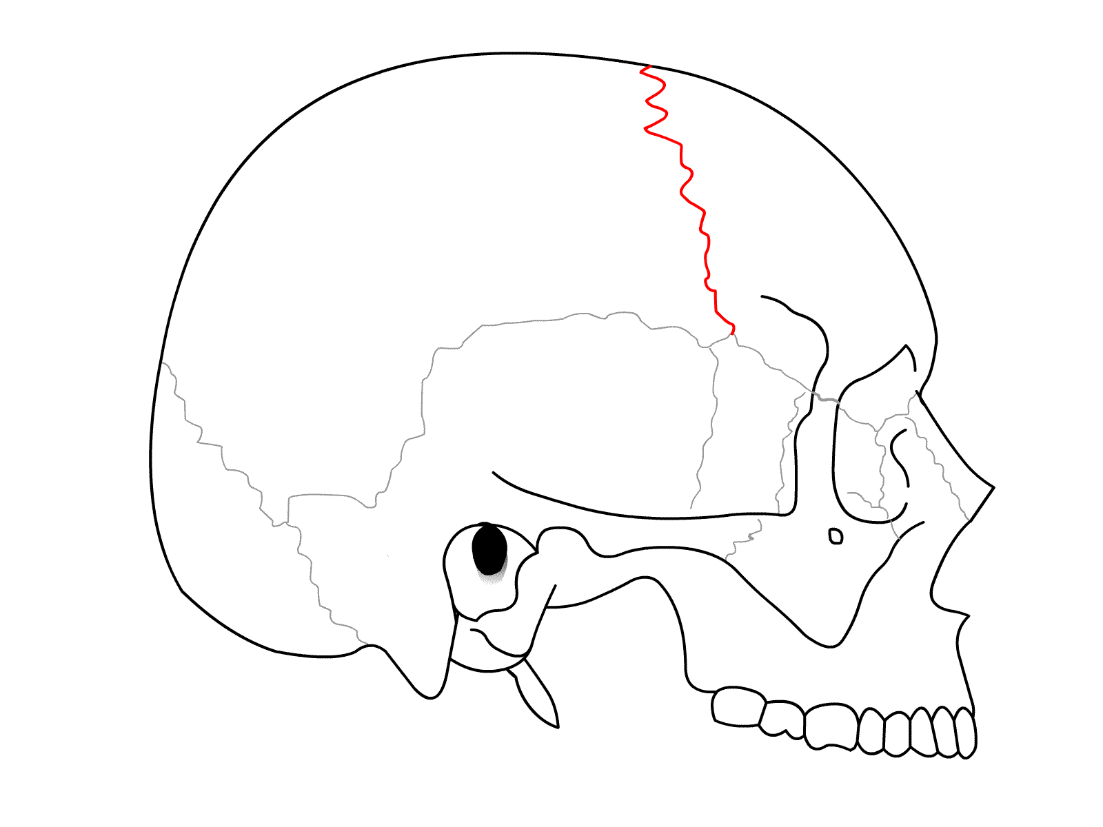 Schädel seitlich - Sutura